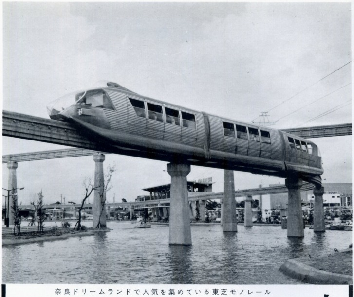 奈良ドリームランドのモノレール